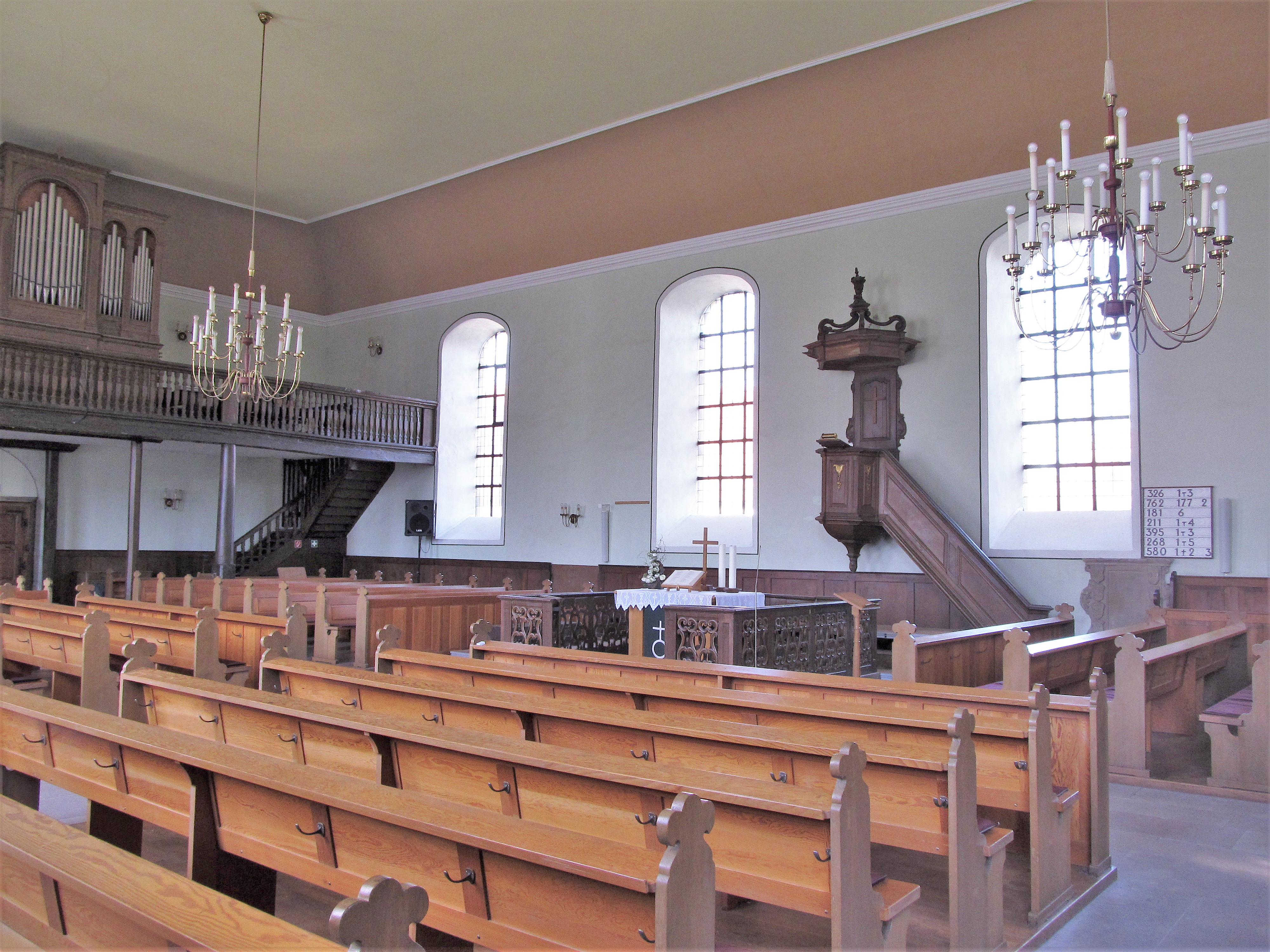 Blick ins Innere der protestantischen Christuskirche in Mimbach, einem Stadtteil von Blieskastel, Saarland